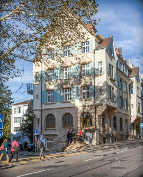 Institut des int. Seminars für Analytische Psychologie ISAPZURICH Stampfenbachstr. 115, 8006 Zürich